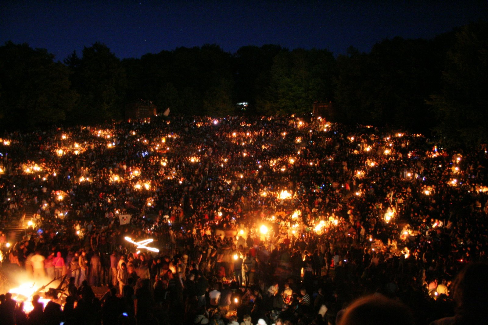 Bild der Menschenmenge in der Walpurgisnacht auf der Thingstätte auf dem Heiligenberg in Heidelberg